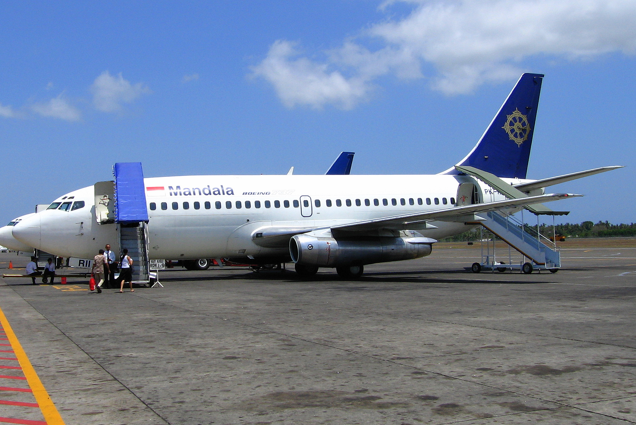 Mandala Airlines auf dem Flughafen Denpasar